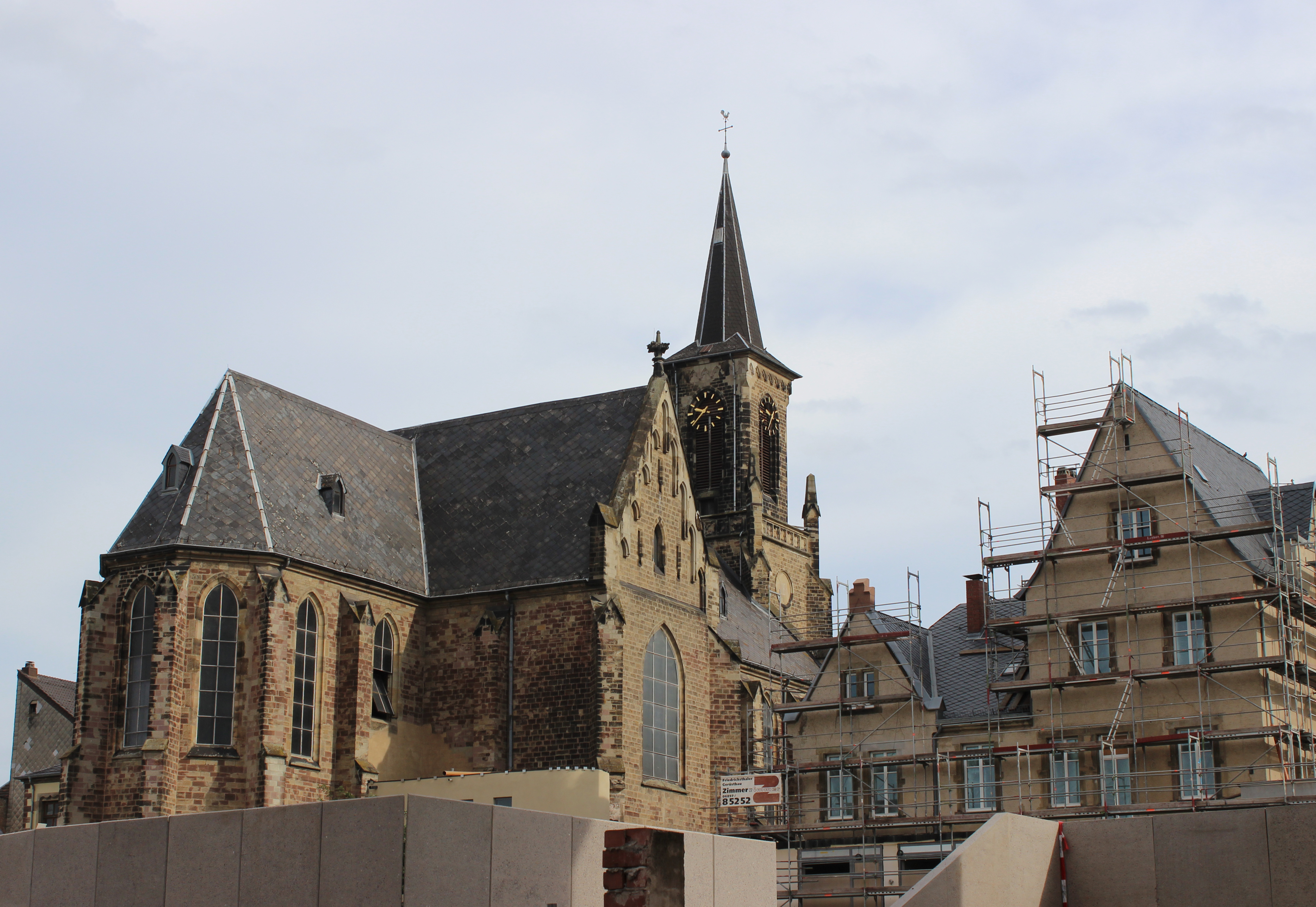 Die katholische Pfarrkirche St. Eligius in Burbach, einem Stadtteil der saarländischen Landeshauptstadt Saarbrücken